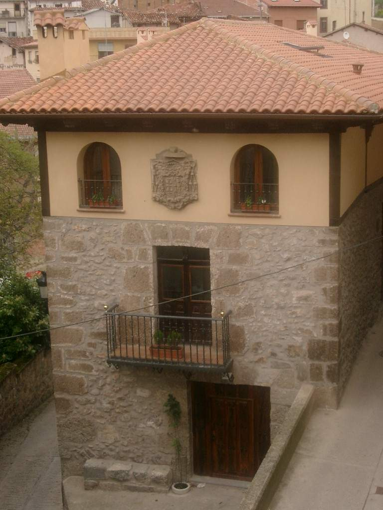 Una casona de Anguiano con escudo eclesiástico